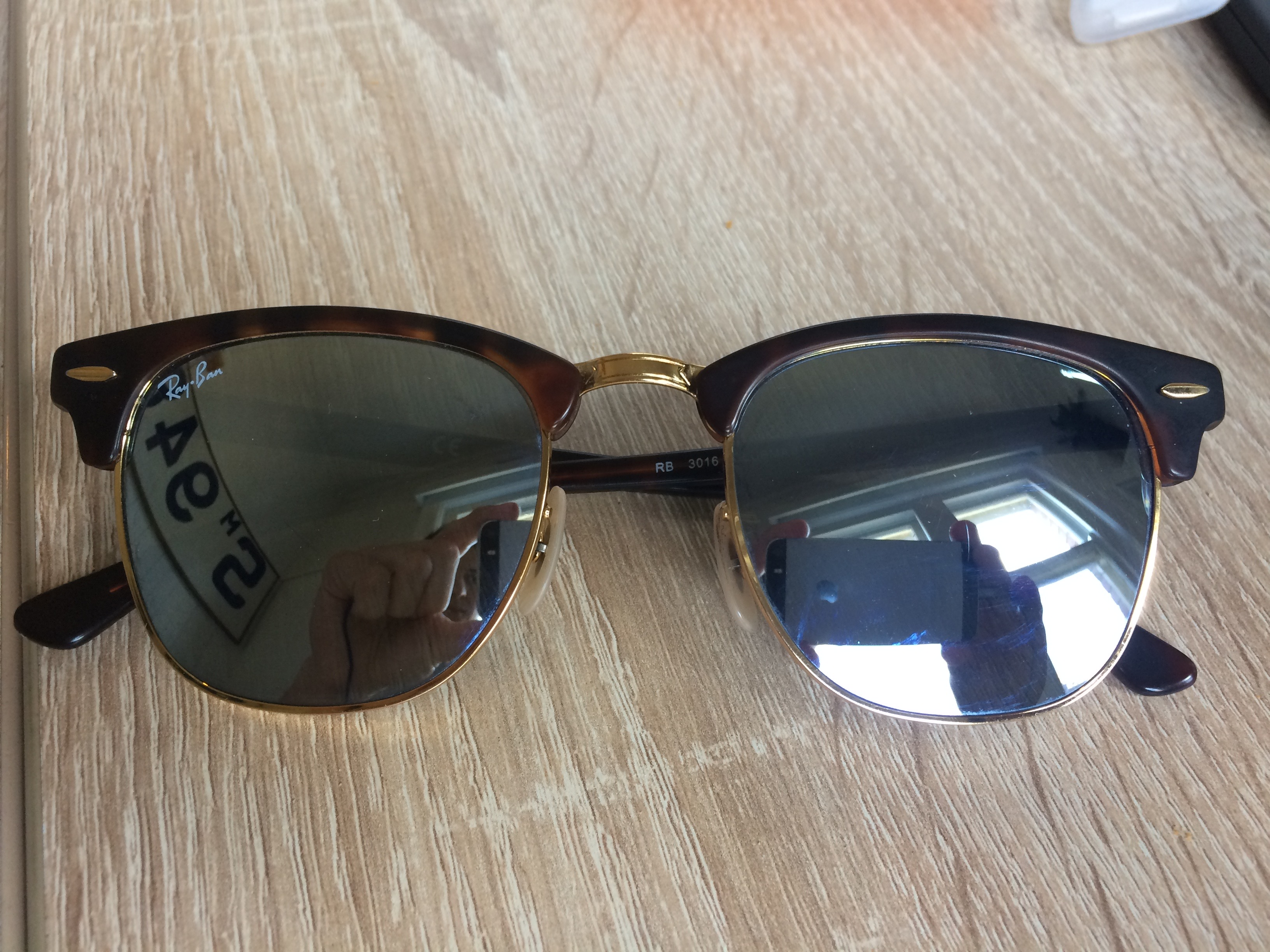 Классический Ray-Ban Clubmaster RB3016